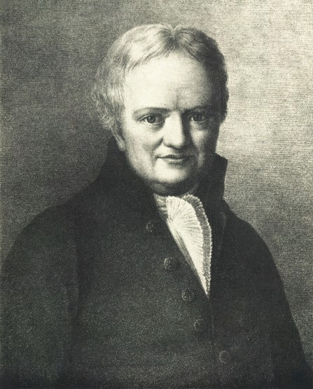 Jakob Friedrich Abel, Lithographie